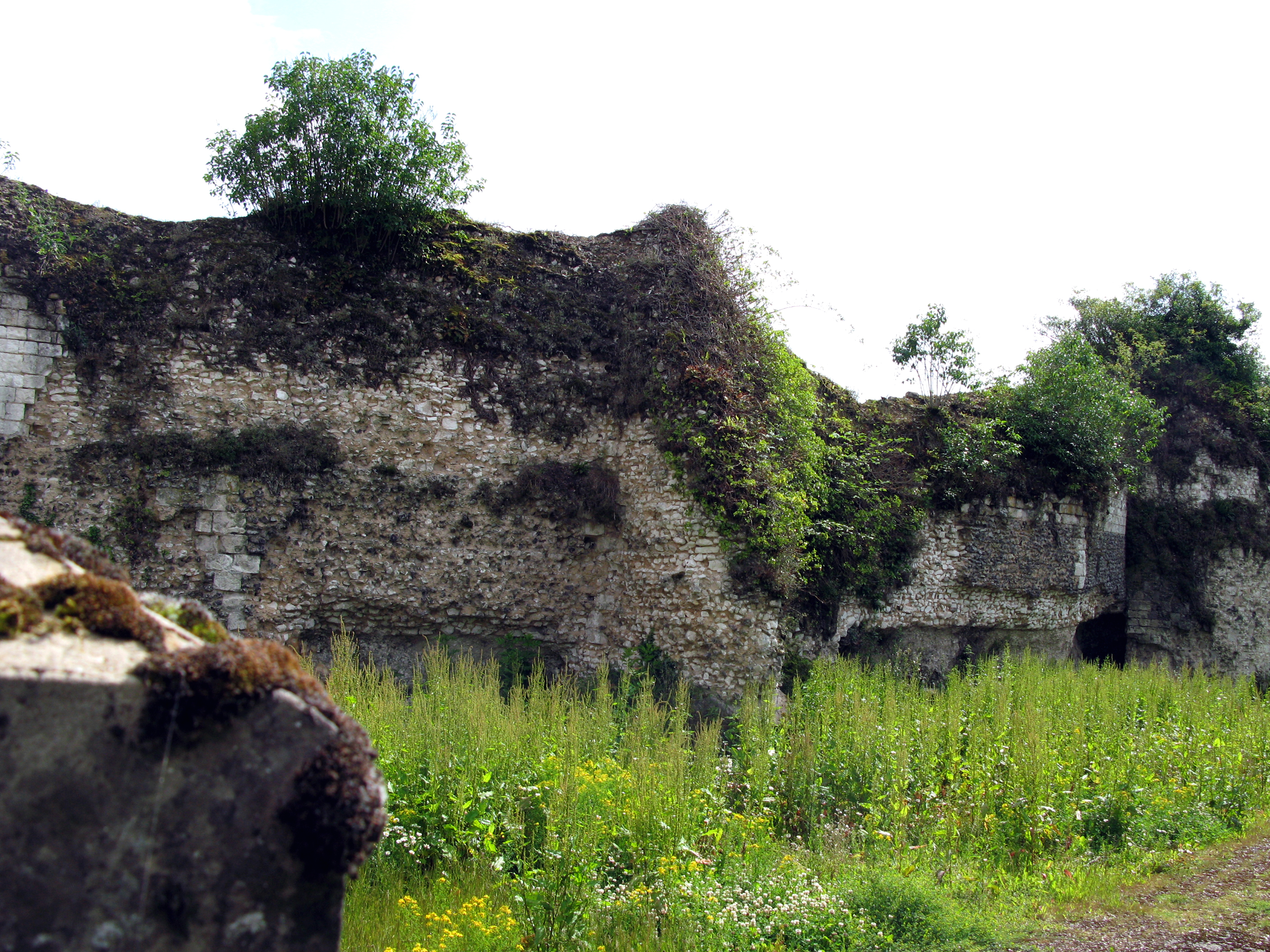 Saint-Riquier (Somme, France) - Les vestiges du rempart à l'entrée Nord de la ville. .